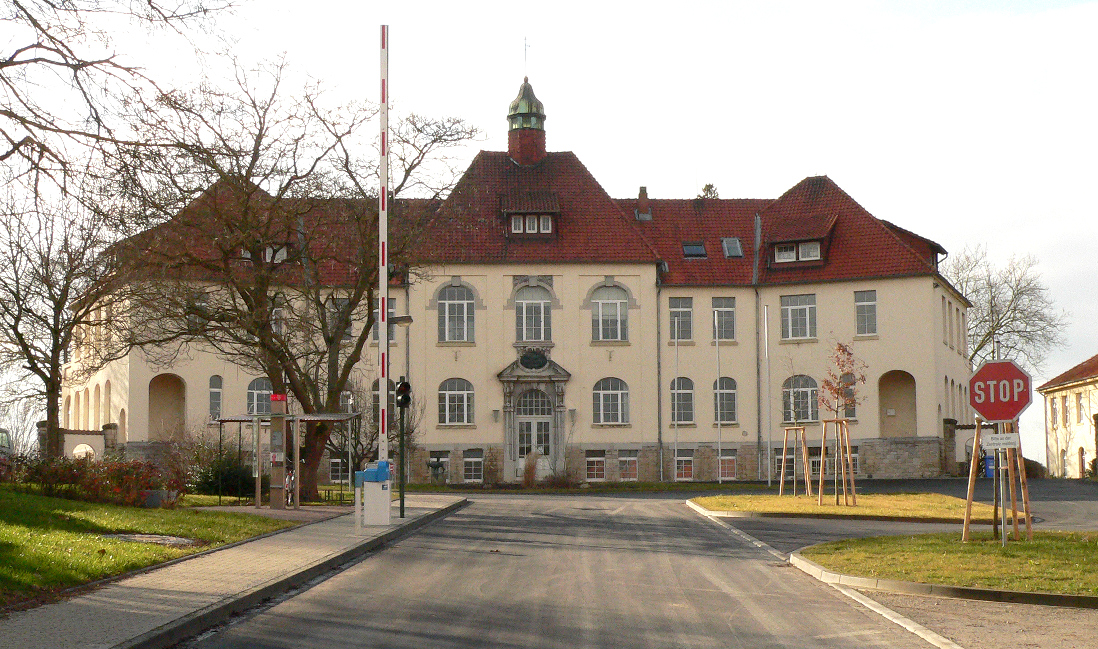 JVA Rosdorf, altes Verwaltungsgebäude